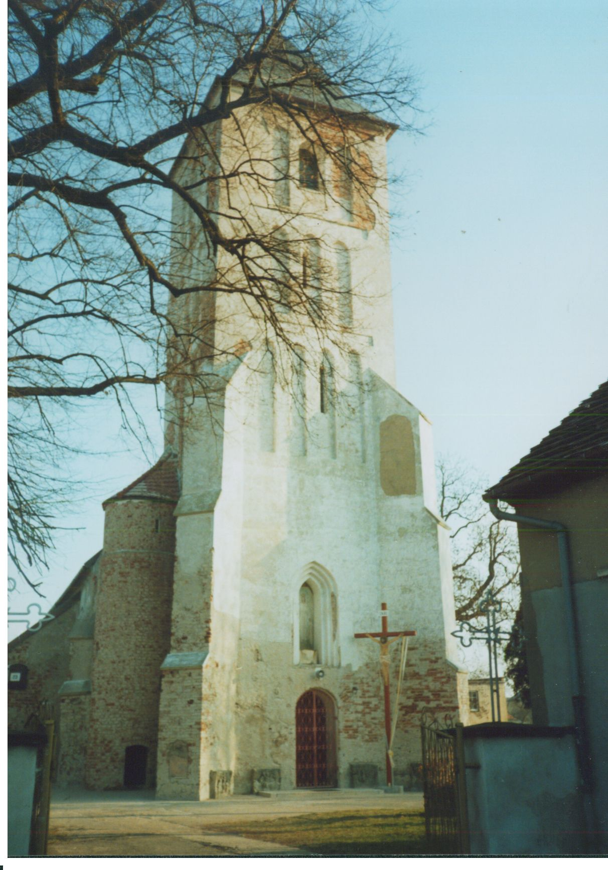 Kościół św. Marcina w Grębocicach